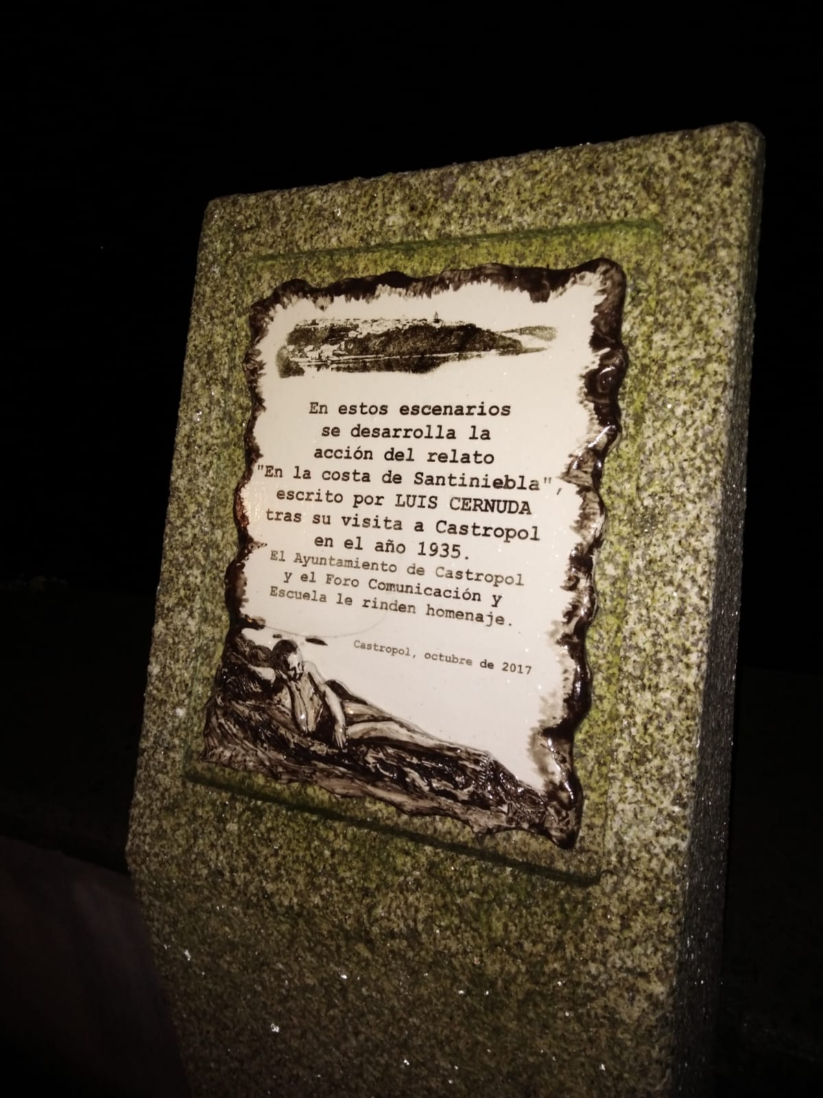 placa conmemorativa de luis cernuda en castropol